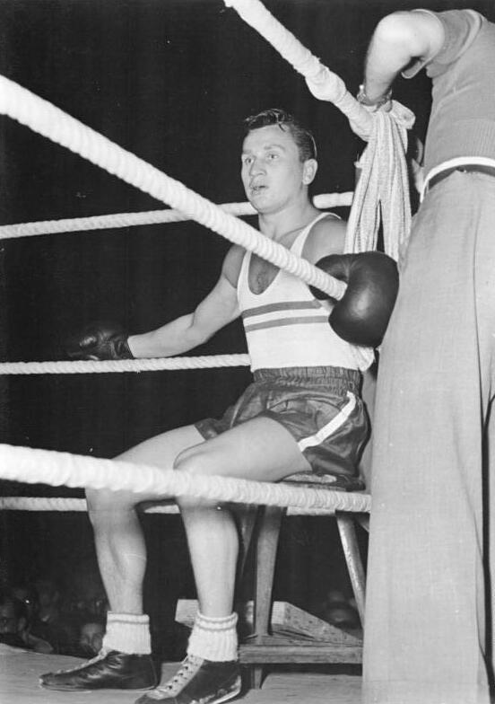 Stefaniuk Zentralbild TED 6.10.1953 Internationaler Vergleichskampf SV Gwardia Polen-SV Dynamo Berlin. In deinem Internatiionalen Box-Vergleichskampf standen sich SV Gwardia Polen und SV Dynamo Berlin am 30.9.1953 in der Thüringerhalle in Erfurt gegenüber. Die Boxer der SV Dynamo konnten ihre Niederlage von 15:7 in Berlin wiedergutmachen und schlugen die Vertreter von Polen mit 11:9. UBz: Der Europa-Meister 1953, 2-facher polnischer Meister und Meister des Sportes Stefaniuk.